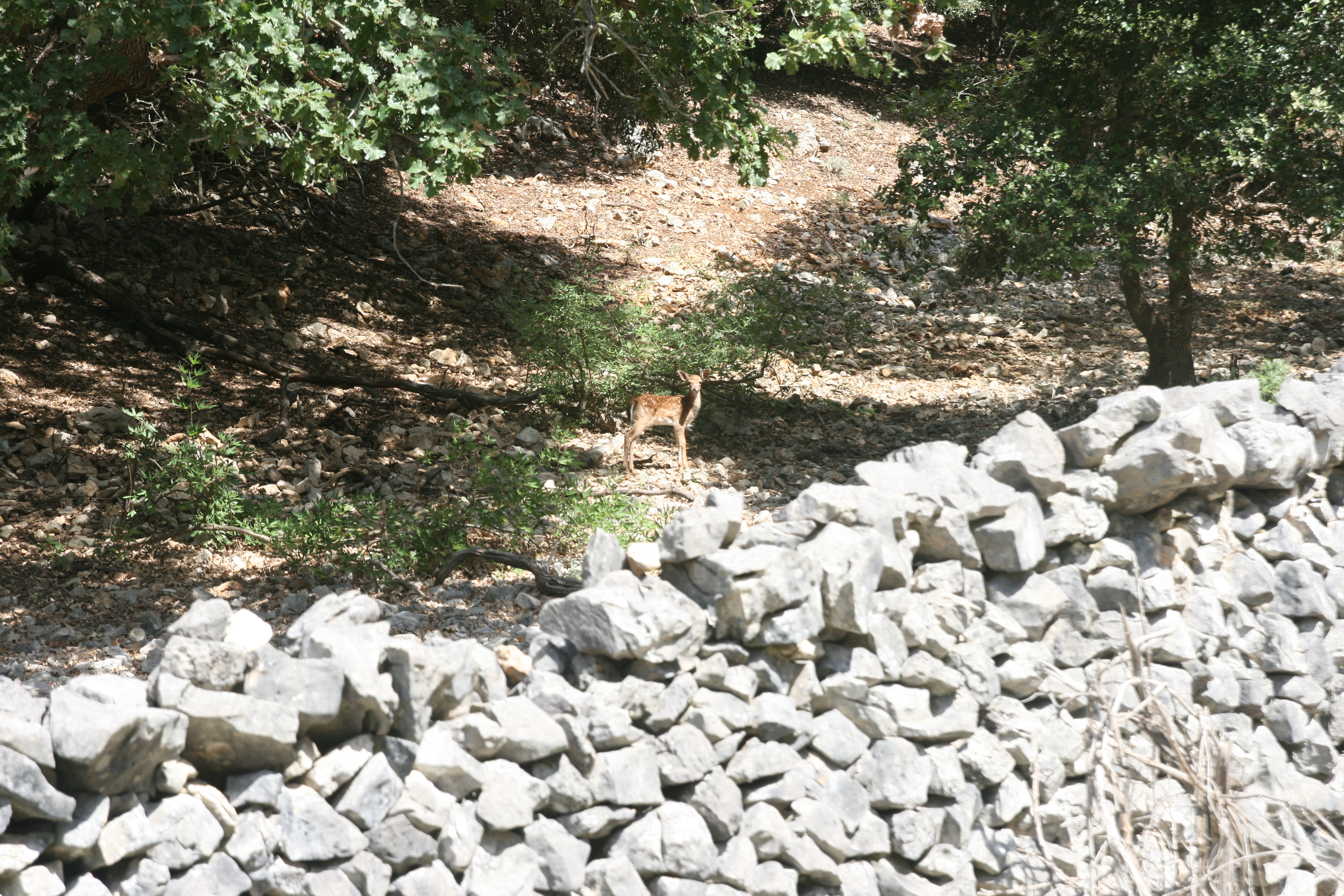 Un daino nell'isola di Plauno